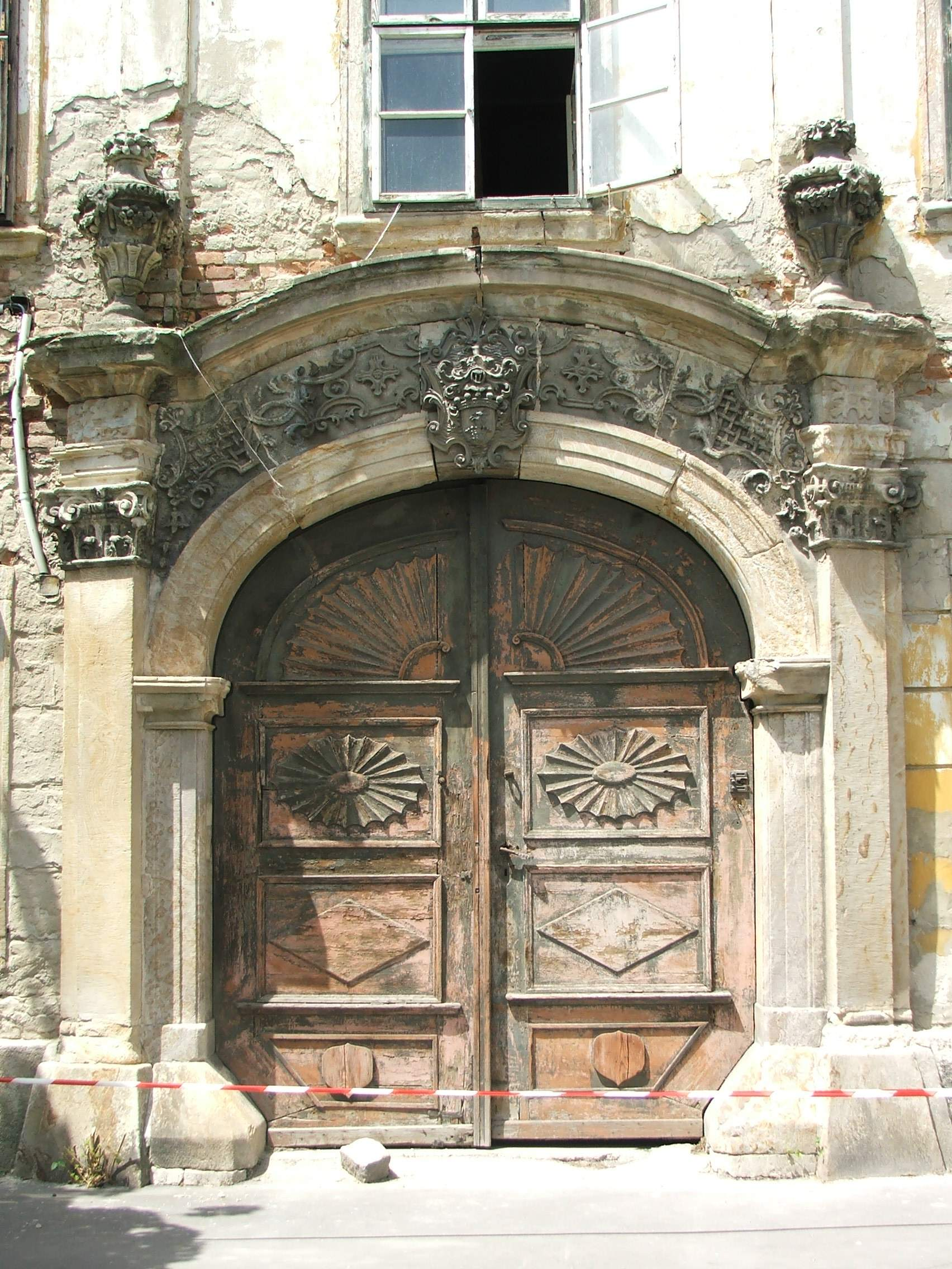 A Sándor-palota kapuja, Esztergom